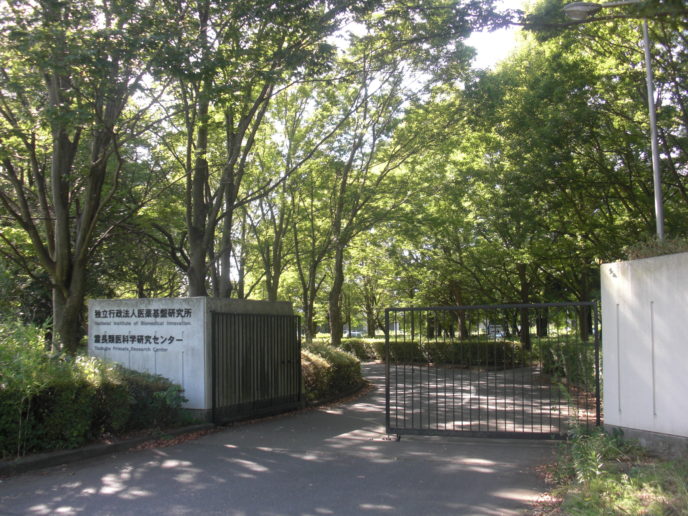 This is a gate of Tsukuba Primate Research Center, National Institute of Biomedical Innovation in Tsukuba, Ibaraki, Japan.